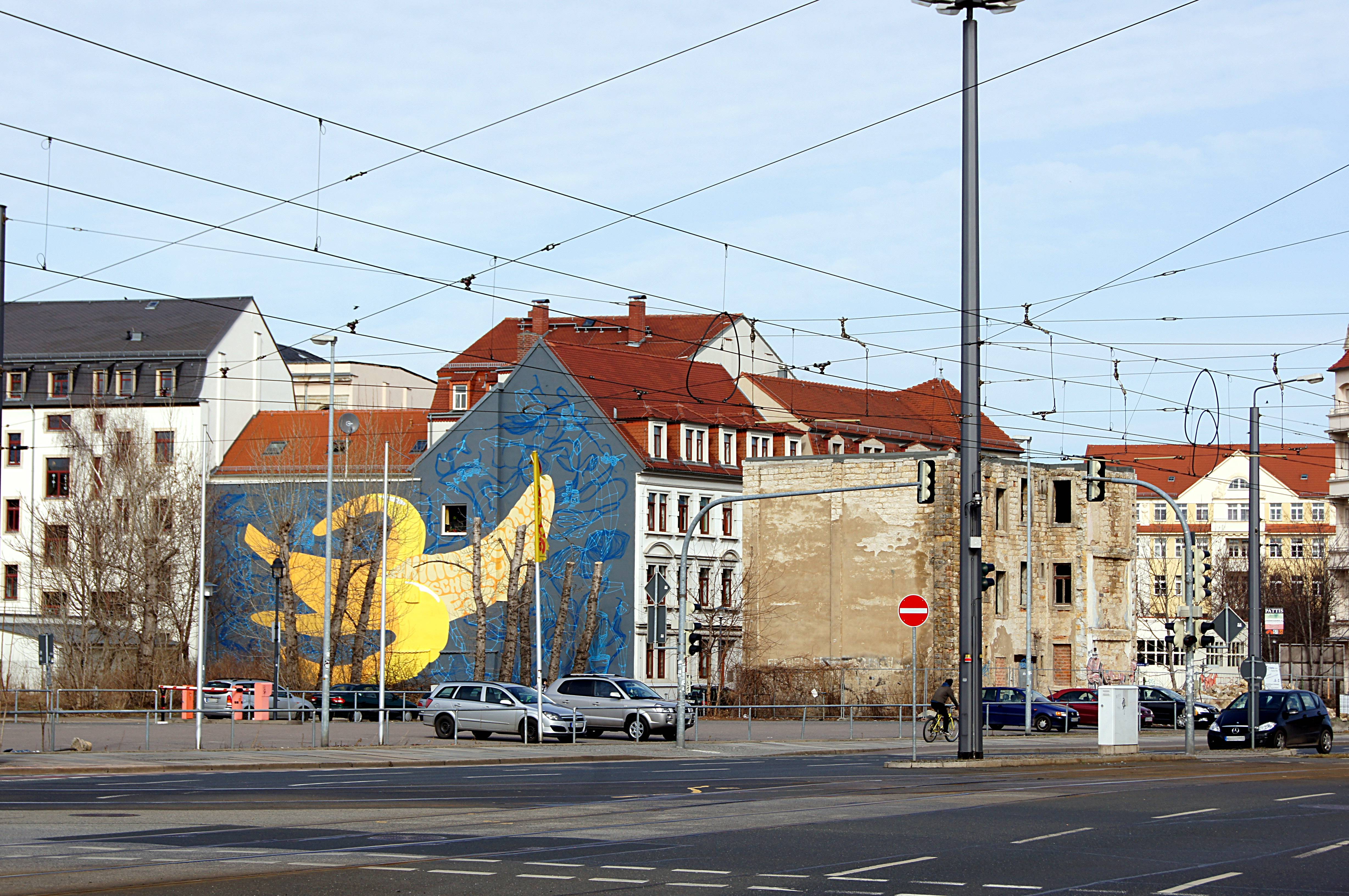 Blick von der Löbtauer Straße über die Schäferstraße zur Adlergasse